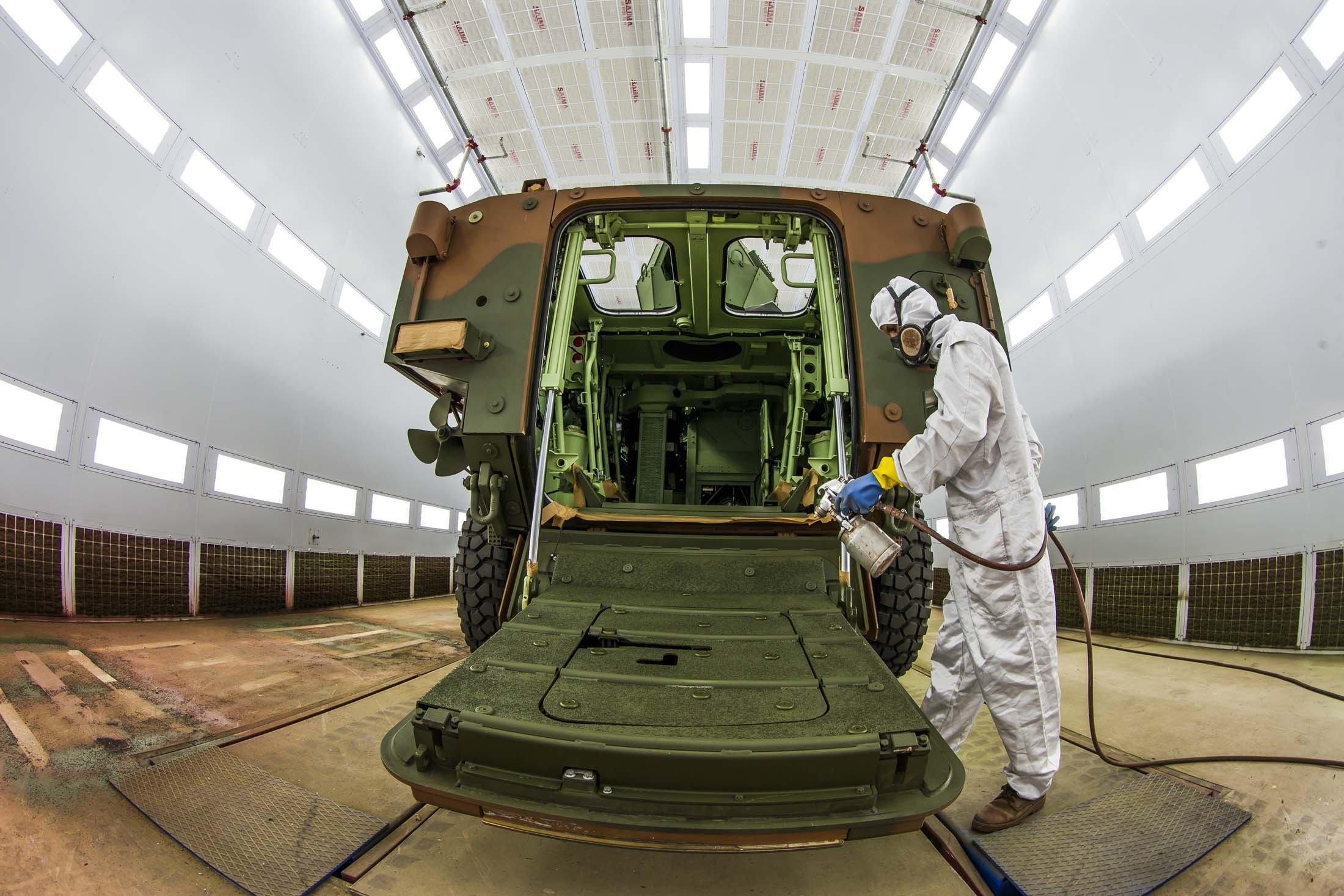 Fotos: Divulgação IVECO